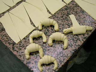 Cornetti, croissant, brioches